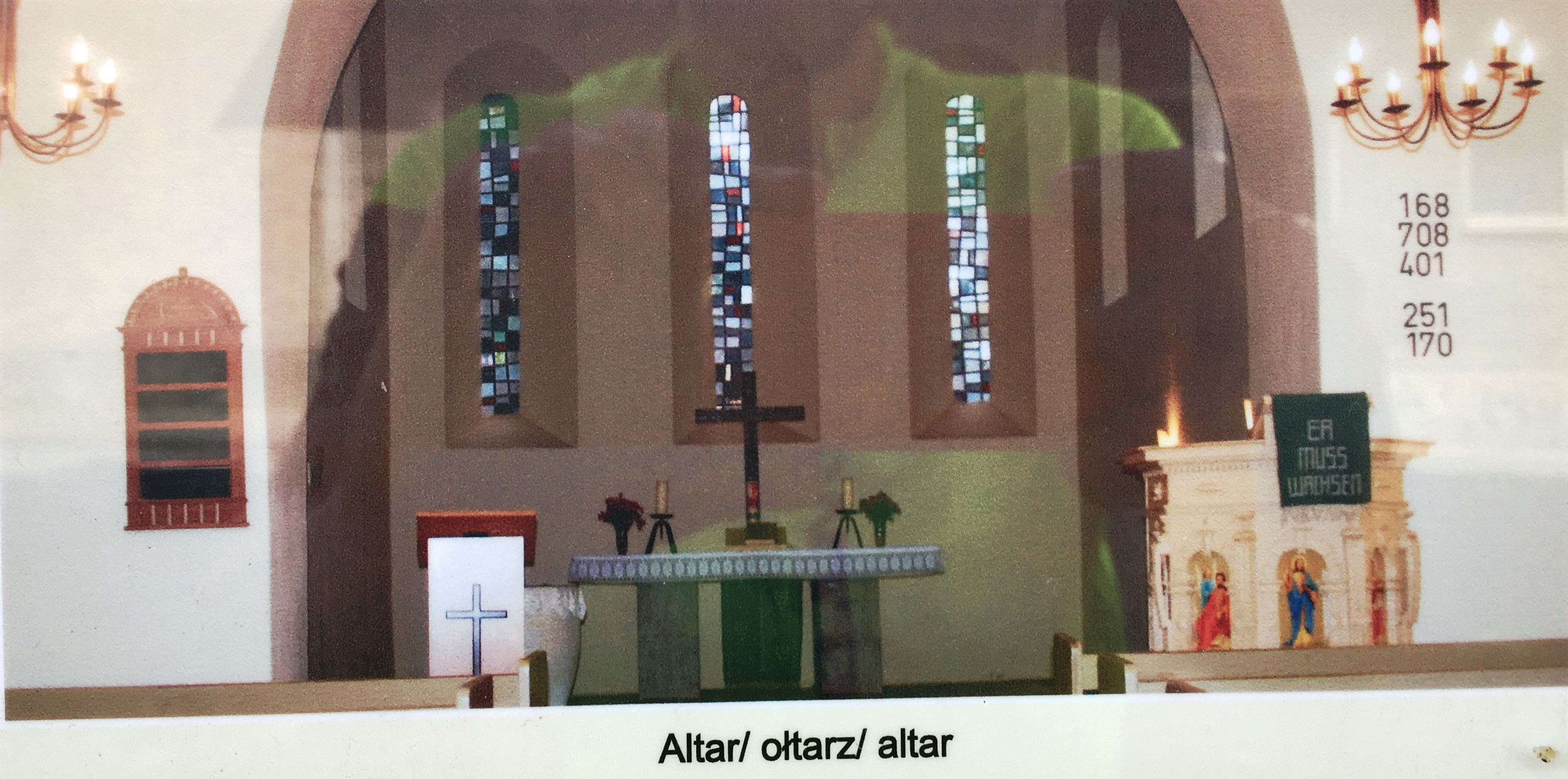 Die Dorfkirche Beerfelde ist eine Feldsteinkirche aus der zweiten Hälfte des 13. Jahrhunderts. Im Innern stehen unter anderem die Reste eines Altarretabels aus dem Jahr 1713, ein Kanzelkorb aus dem Jahr 1675 sowie eine Sauer-Orgel.